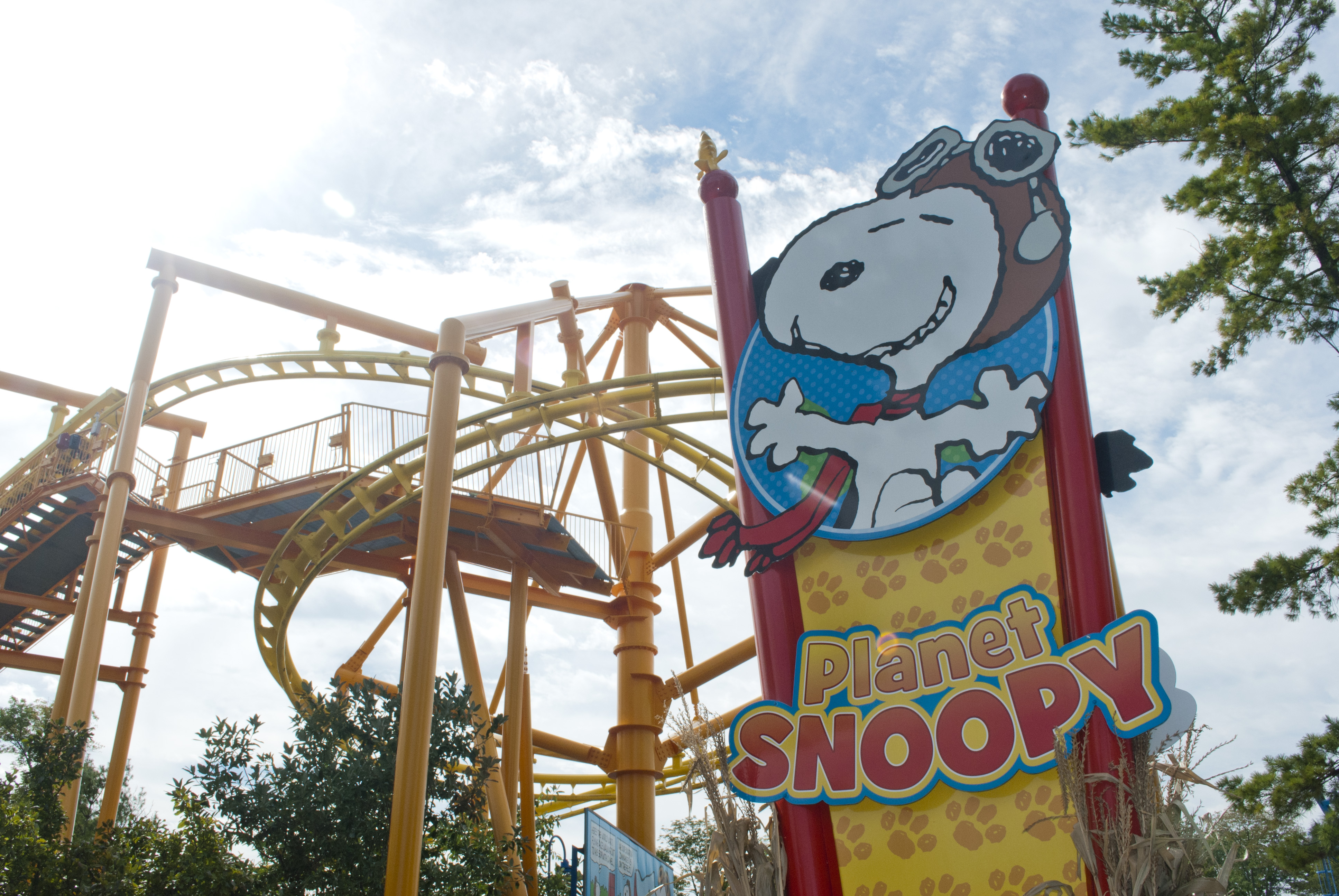 Área de Snoopy en Kings Island